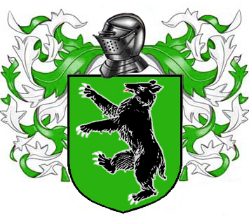 Estandarte creado con photoshop usando material libre o creado ex profeso por mi e inspirado por las obras de Canción de Hielo y Fuego.